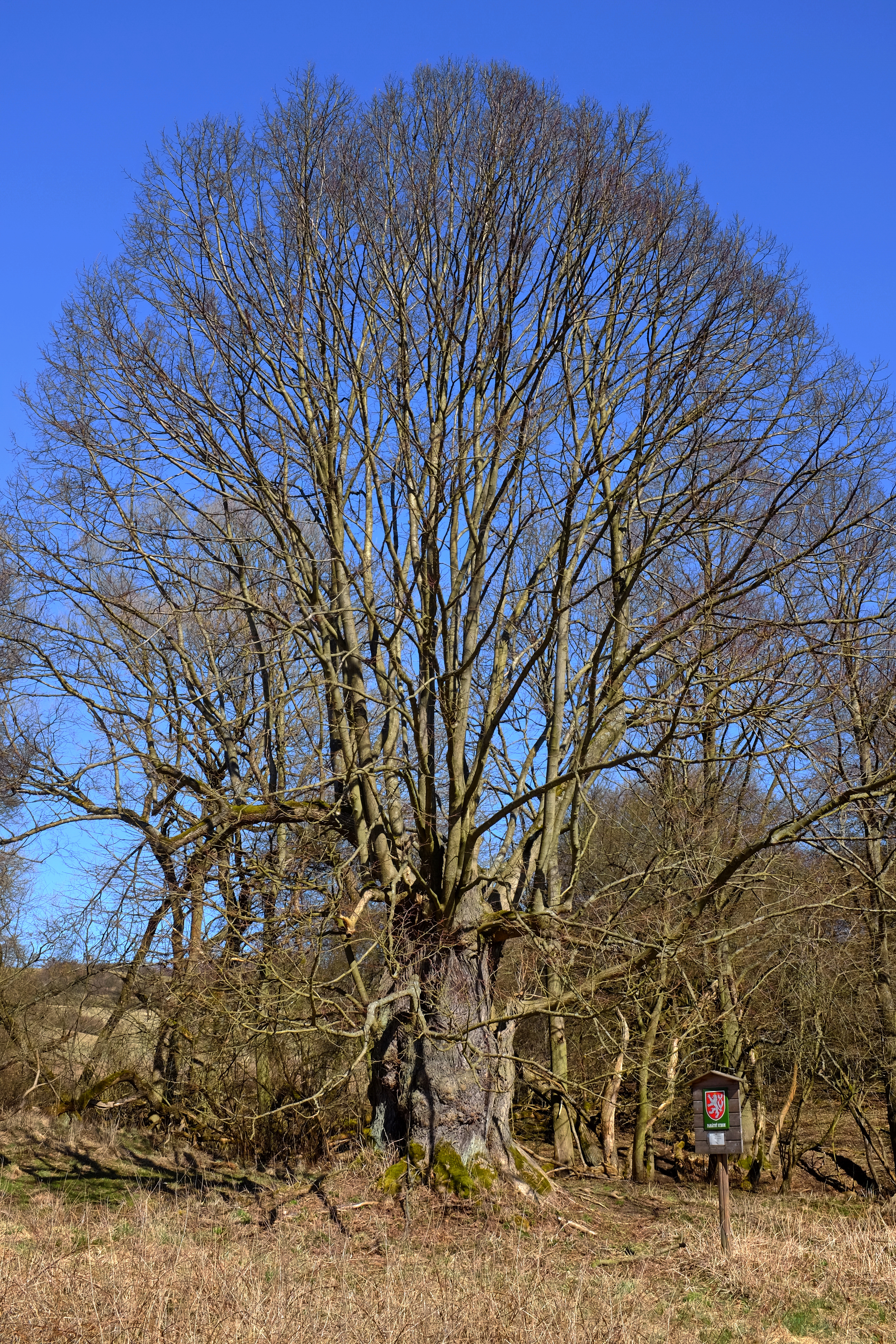 Památný strom - Damická lípa u potoka - osada Damice, část obce Krásný Les, okres Karlovy Vary